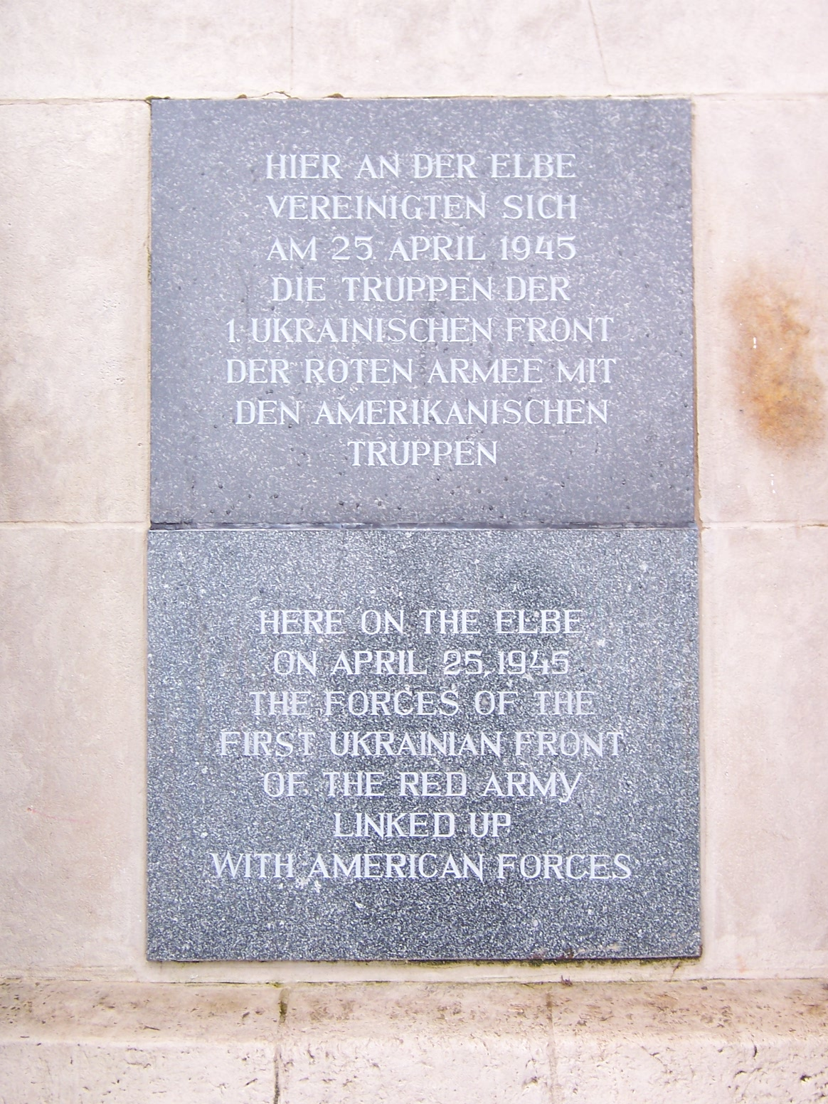 Denkmal der Begegnung zwischen amerikanischen und sowjetischen Truppen in Torgau an der Elbe (Sachsen) - deutsche und englische Inschrift / Soviet monument commemorating the meeting of US and Soviet troops in Torgau, Saxony (Germany) - German and English inscriptions eigene Aufnahme vom 16. April 2006 / own work, photo taken on 16 April 2006